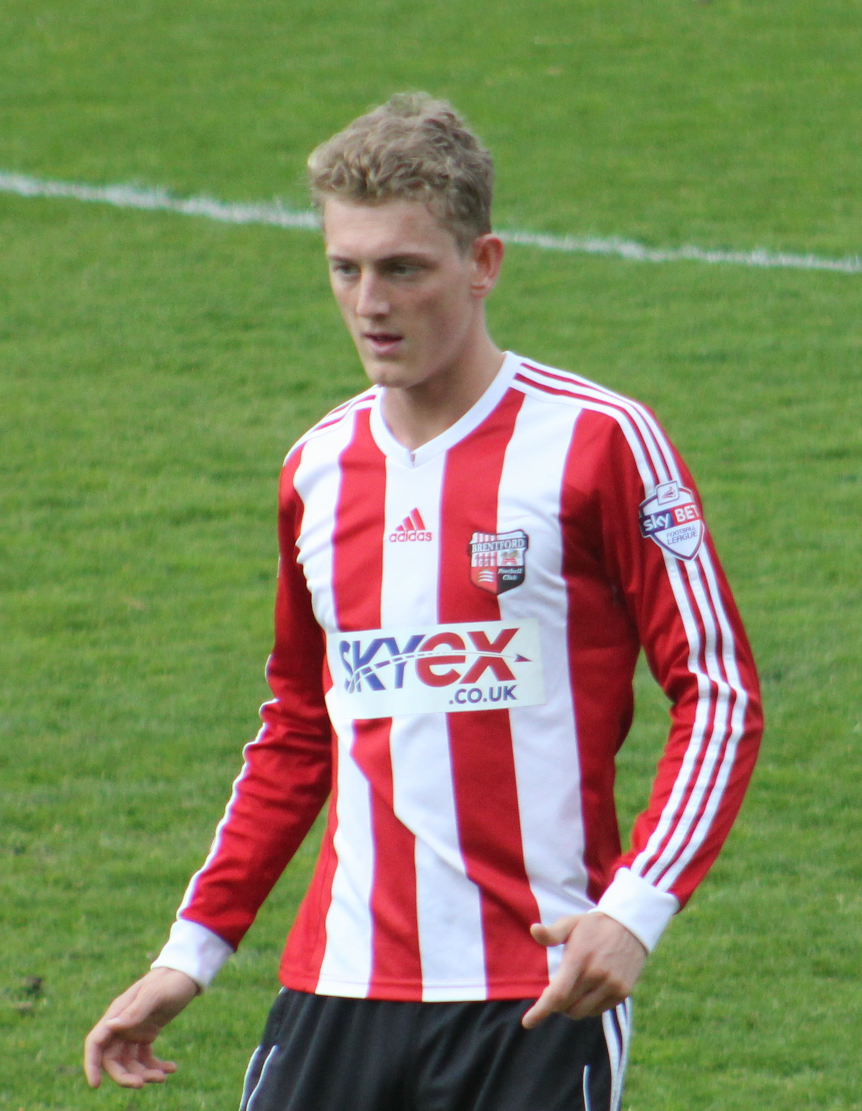 George Saville playing for Brentford